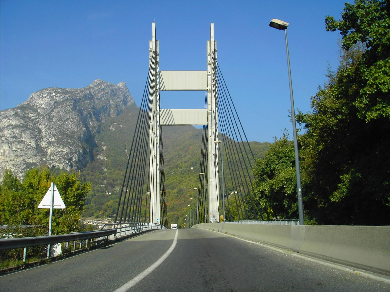 Pont d'Oxford à Grenoble